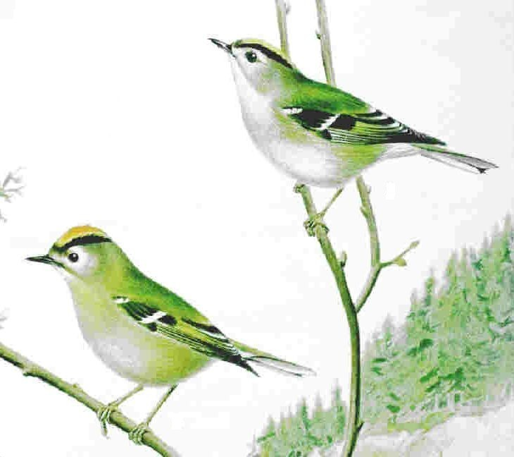 Wintergoldhähnchen (Regulus regulus)